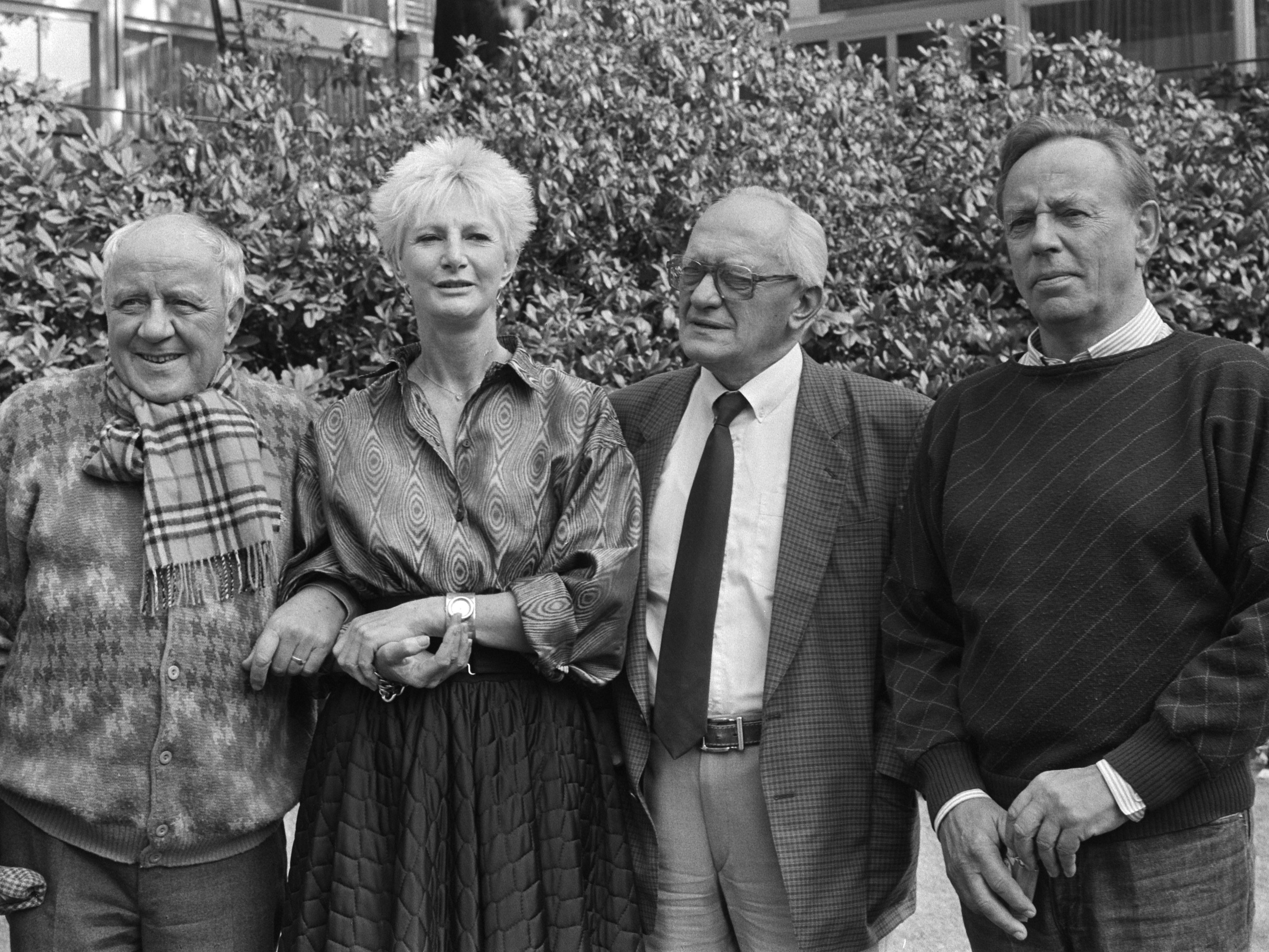 Hoofdrolspelers tv-serie "De Brekers" ; v.l.n.r. Johnny Kraaijkamp, Adèle Bloemendaal, Sacco van der Made, Rijk de Gooyer 26 september 1985